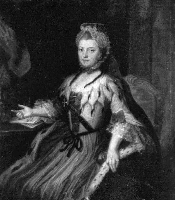 Porträt der Vilicher Äbtissin Caroline von Satzenhofen